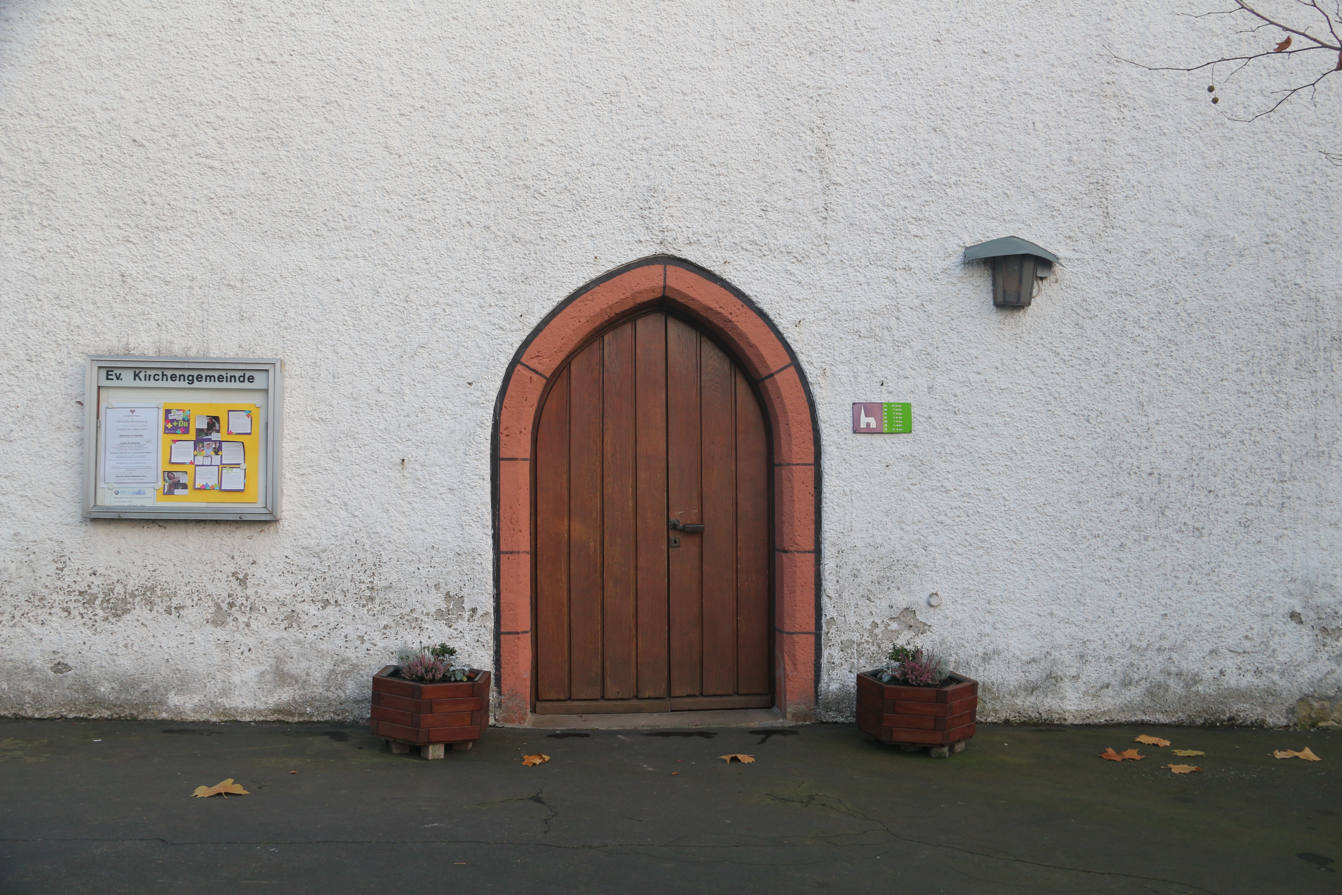 Evangelische Kirche (Rodheim-Bieber)